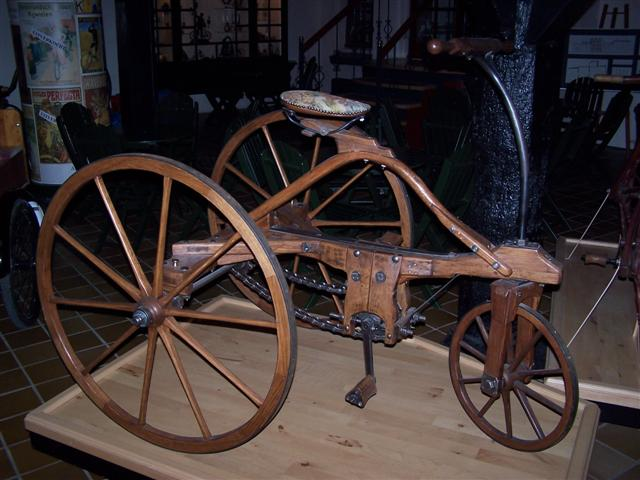 Antique Tricycle (Nationaal Fietsmuseum Velorama, Nijmegen, Netherlands)